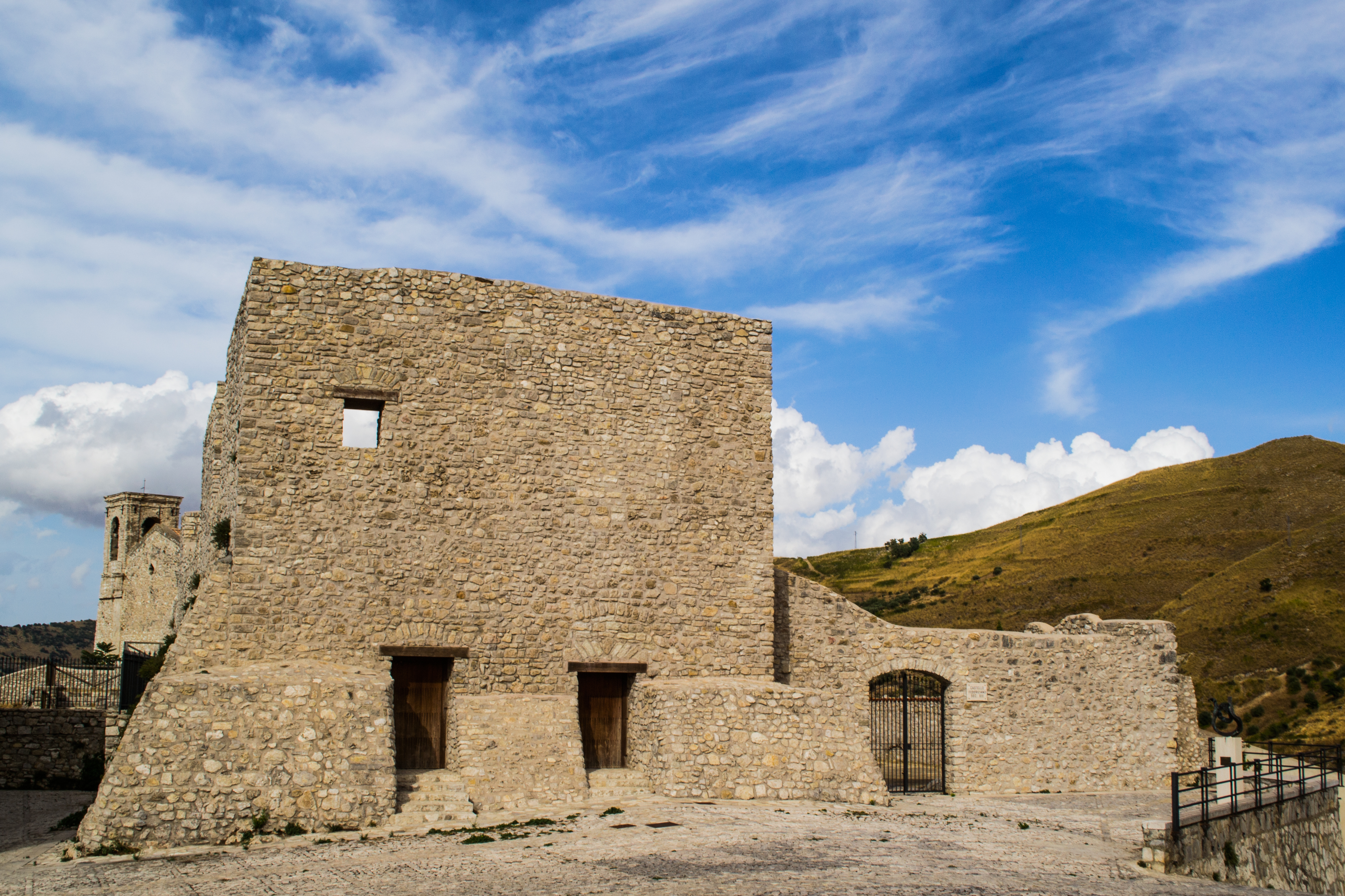 Castello federiciano This is a photo of a monument which is part of cultural heritage of Italy.